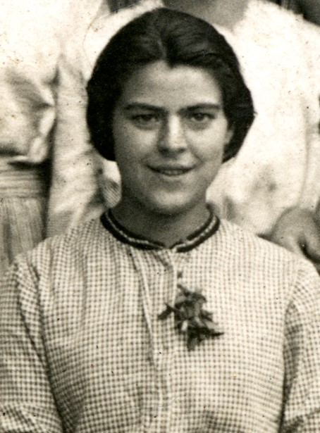 Fragment d'una imatge presa a les treballadores de la fàbrica tèxtil “Hijos de Salvador García”, popularment coneguda com a Escaló. En ella apareix l'única imatge, fins hui coneguda, de Teresa Mora Ferrándiz.